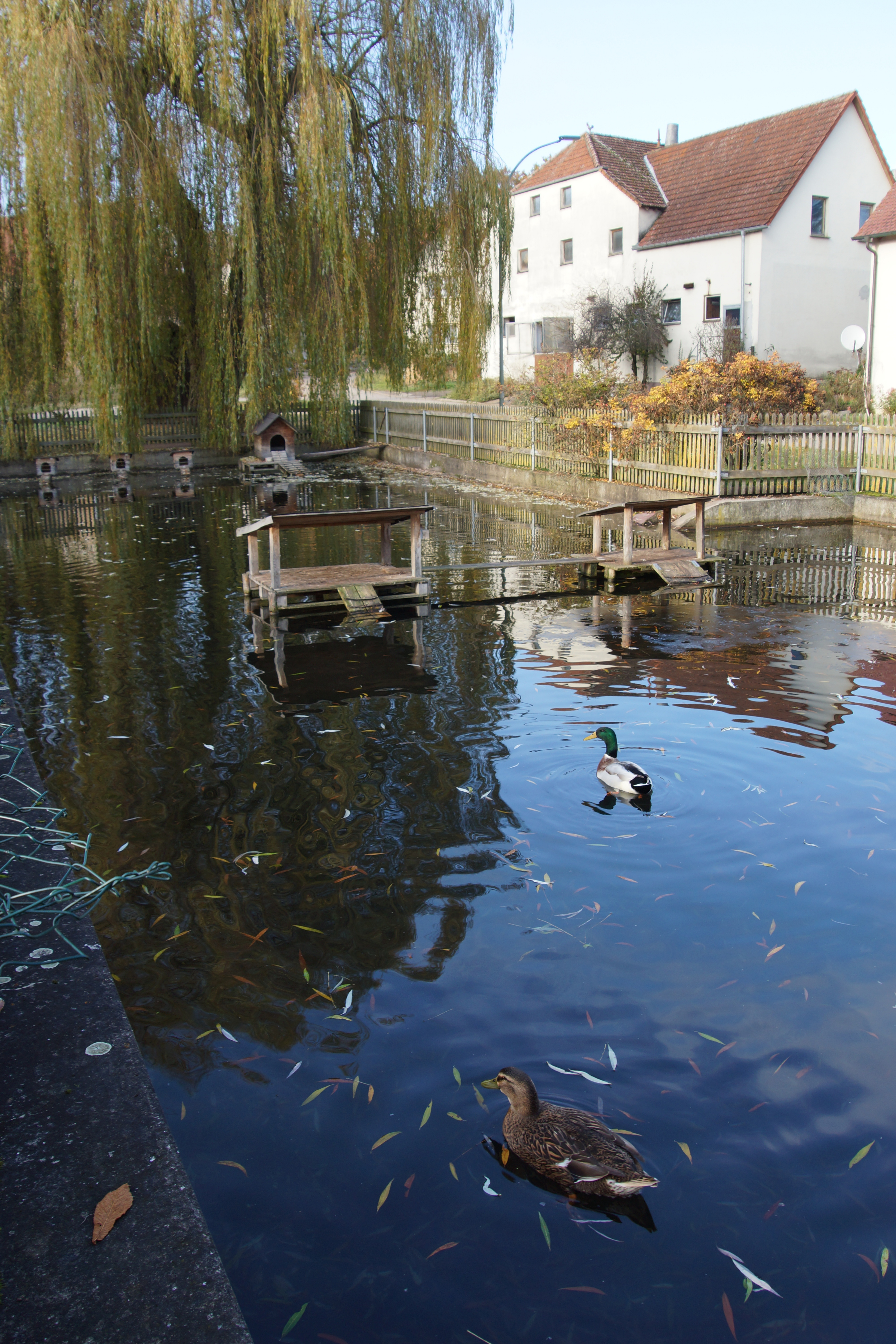 Kainsricht nördlich von Amberg in der Oberpfalz